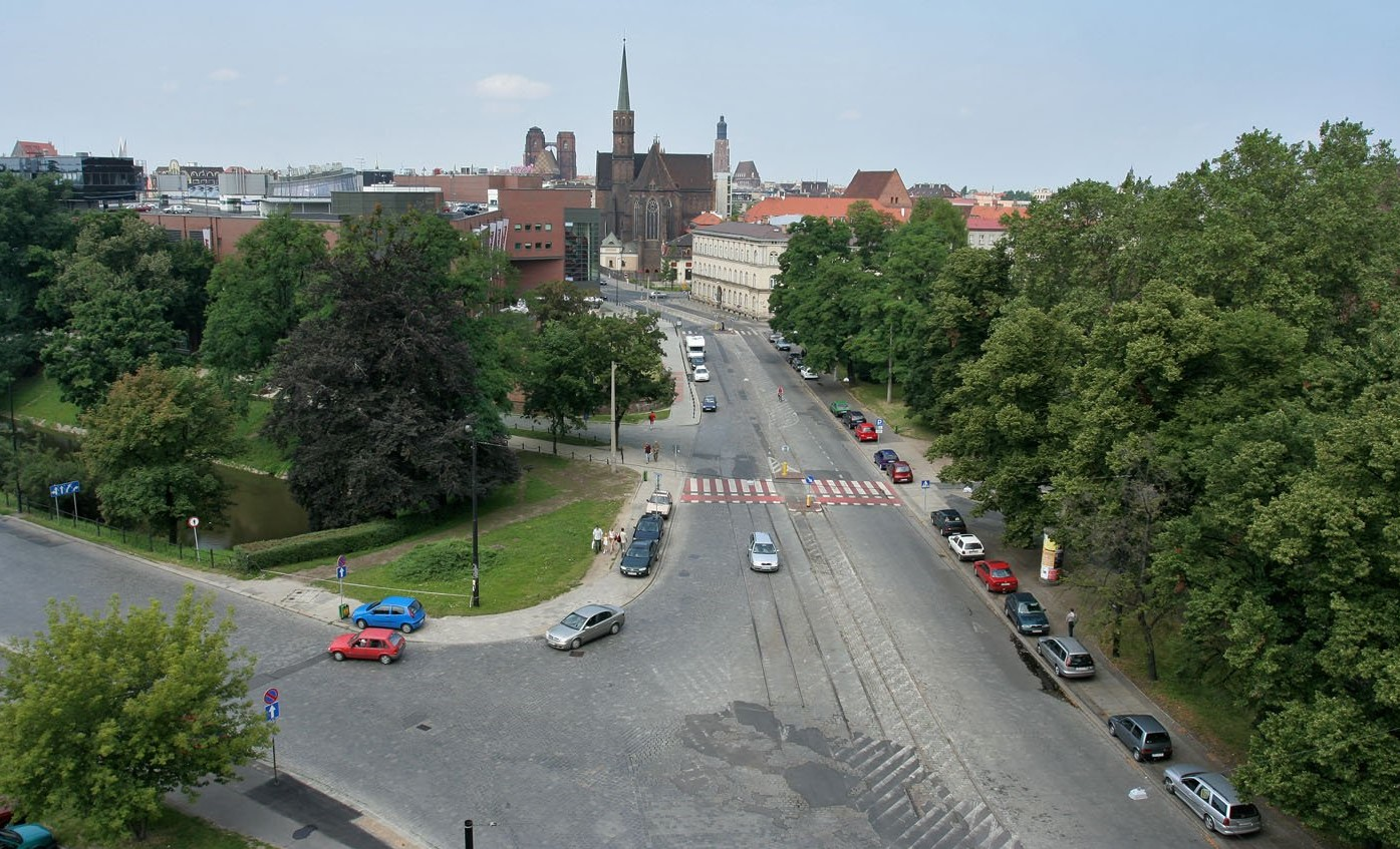 Widok na al. Słowackiego (na wprost) z okna na górnym piętrze gmachu Poczty Głównej. Na pierwszym planie skrzyżowanie z Podwalem (w lewo)